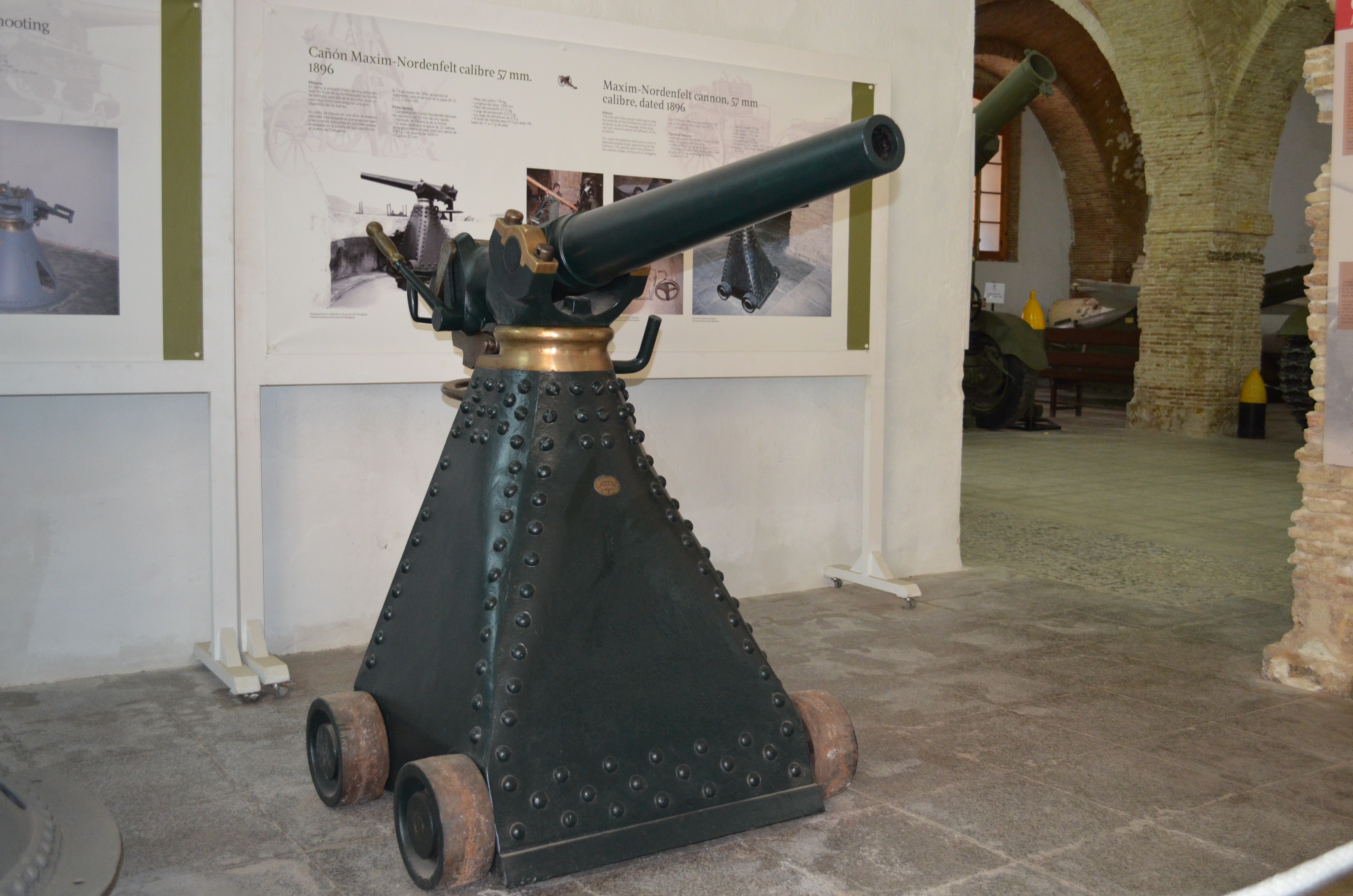 Cañón de 57 mm con afuste para caponera.